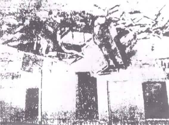 五四